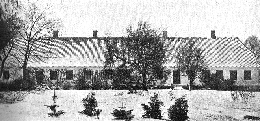 Klingstrup er en gammel bispegård, som tilhørt Odense bispestol før 1536. Gården ligger i Skårup Sogn, Sunds Herred, Svendborg Kommune. Hovedbygningen er opført i 1820.